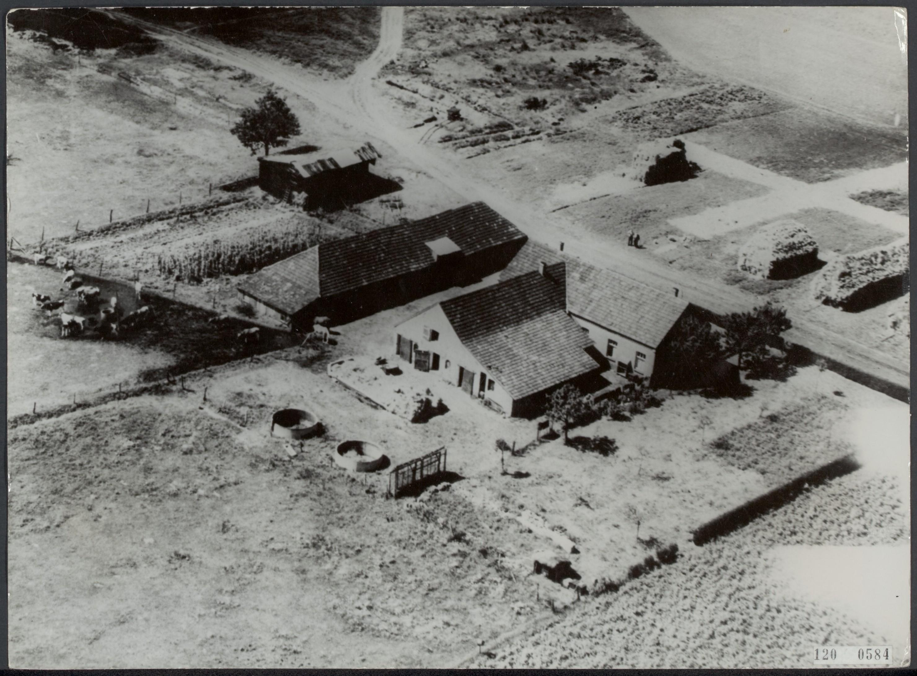 Luchtopname. De boerderij van de familie Poels waar meer dan 300 Amerikaanse en Britse piloten enige dagen verbleven bij hun terugkeer naar Engeland. De opname is gemaakt door een Amerikaans vliegtuig ter voorbereiding van het afwerpen van een krans als dank voor de getoonde moed. Het kruis op de grond geeft de plaats aan waar het oorspronkelijke, en door de Duitsers verwoeste, kruisbeeld heeft gestaan en waar nu een nieuwe is opgericht